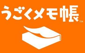 Moving memo Dsiware